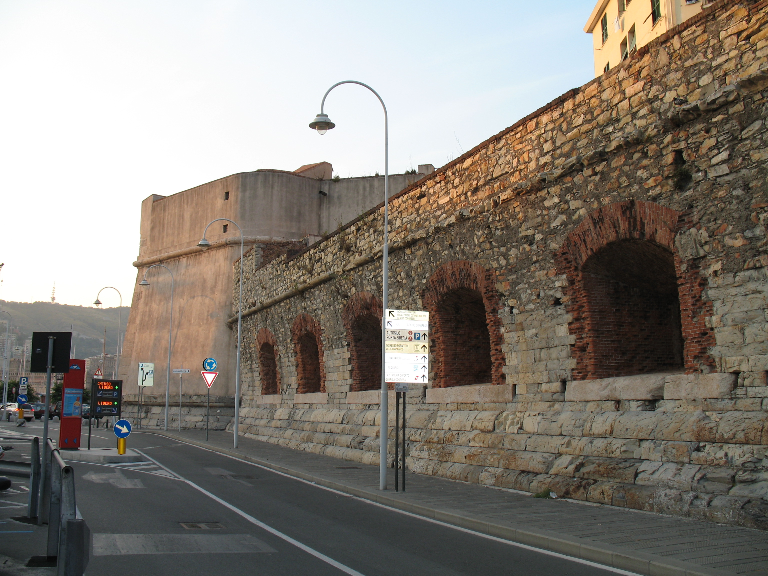 Genova - porto antico Mura e varco di Porta Siberia, porto antico di Genova